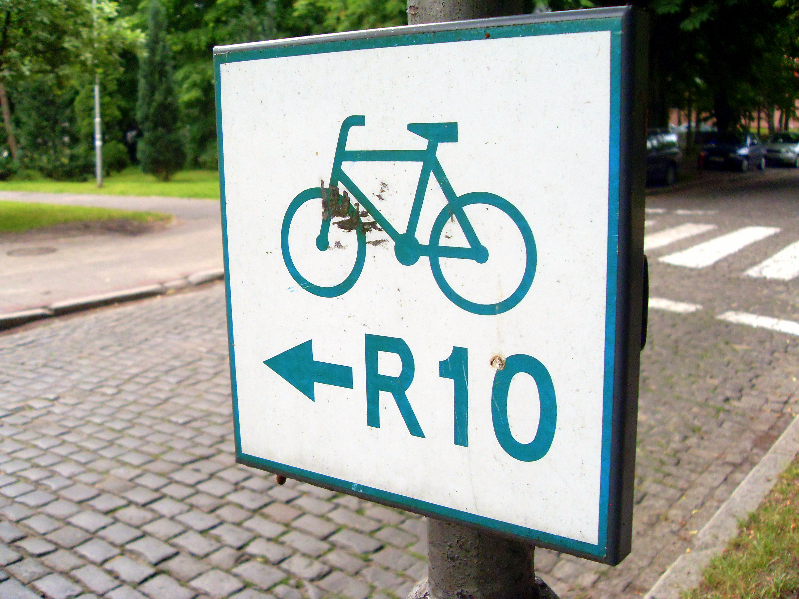 Międzynarodowy szlak rowerowy wokół Bałtyku R-10